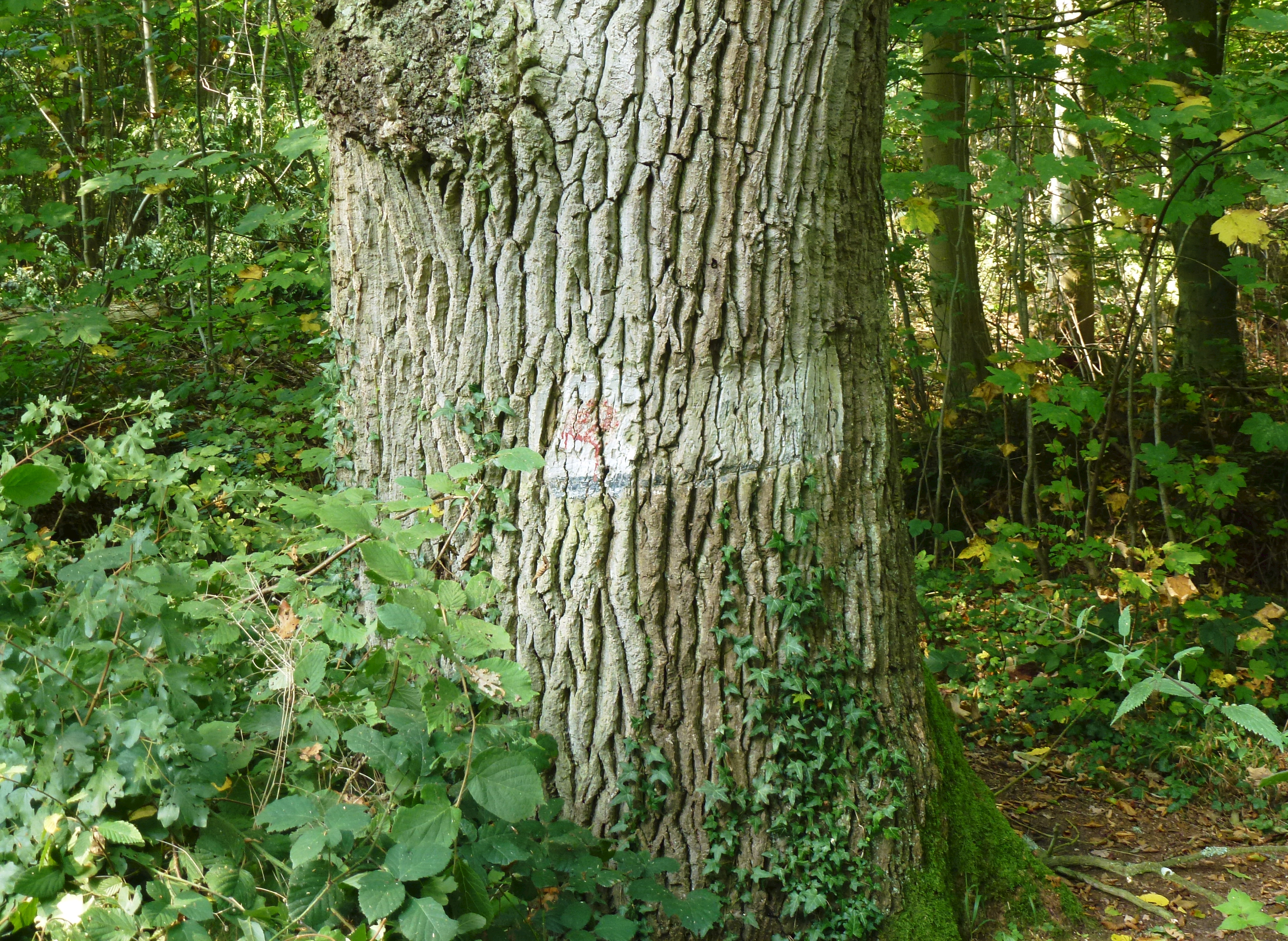 Die Wasserstands-Eiche im Kellenhuserner Forst